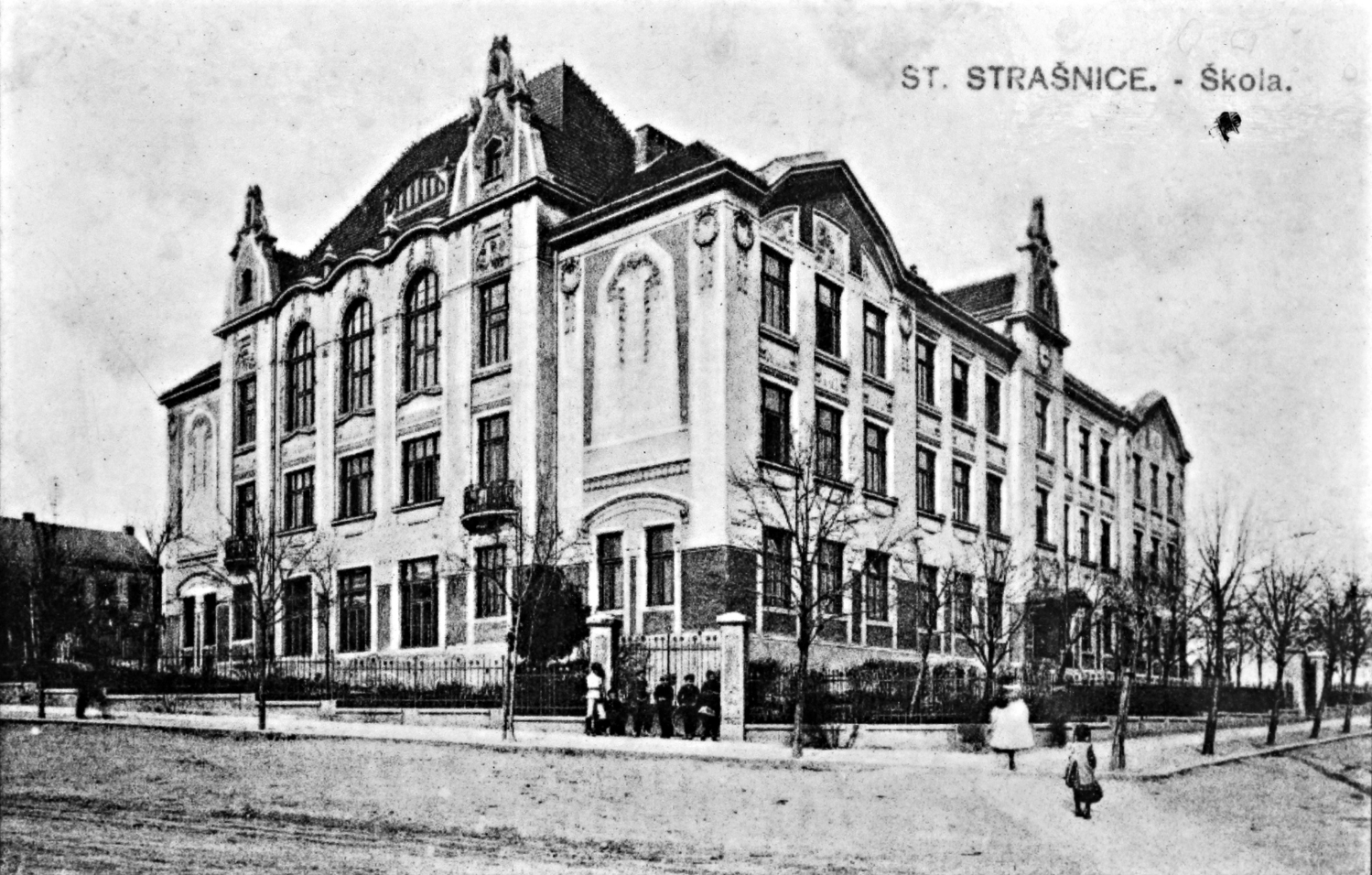 Strašnice stará "Nová" škola